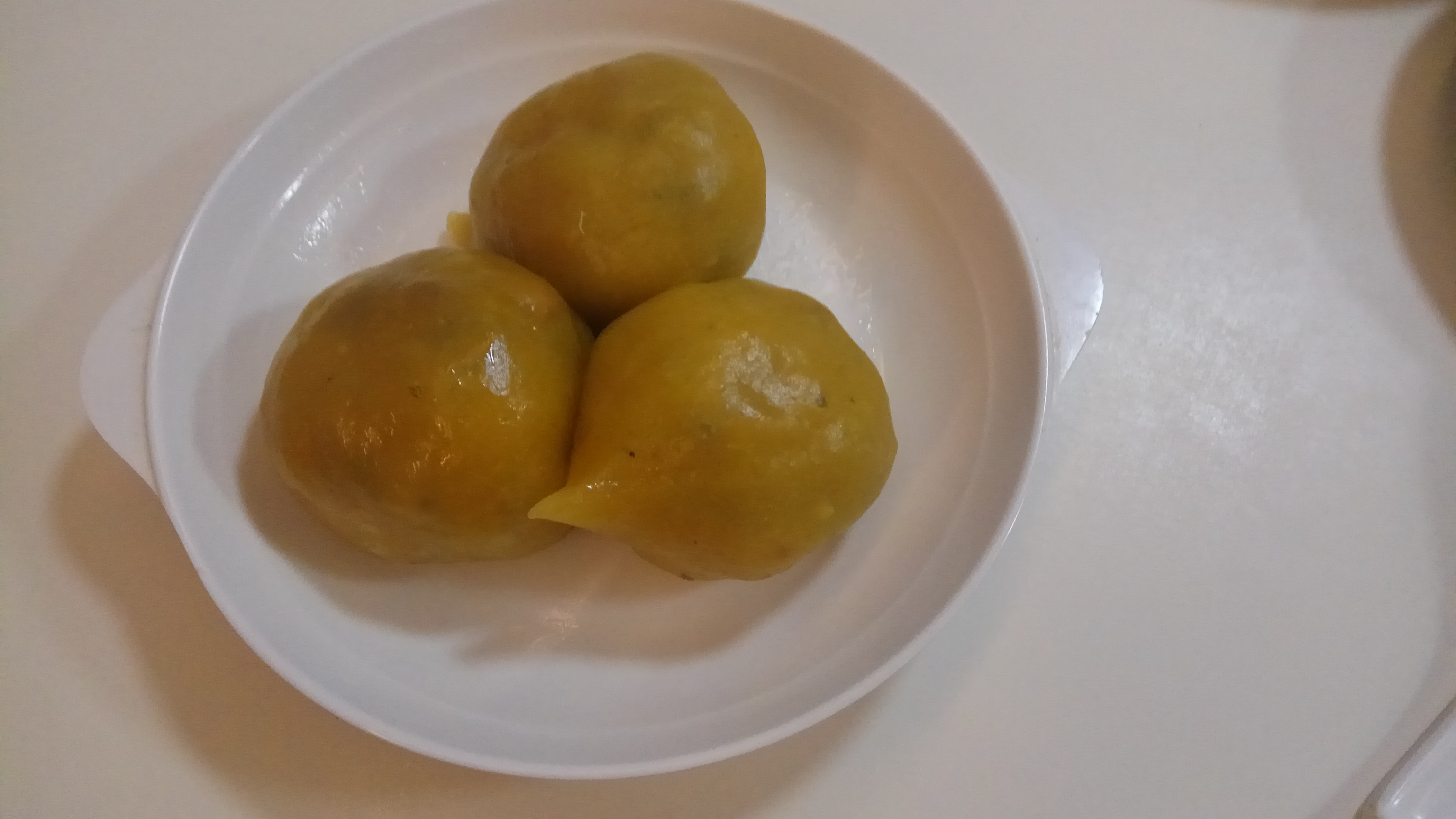 中文（中国大陆）: 番粉圆，浙江台州地区的一种食物